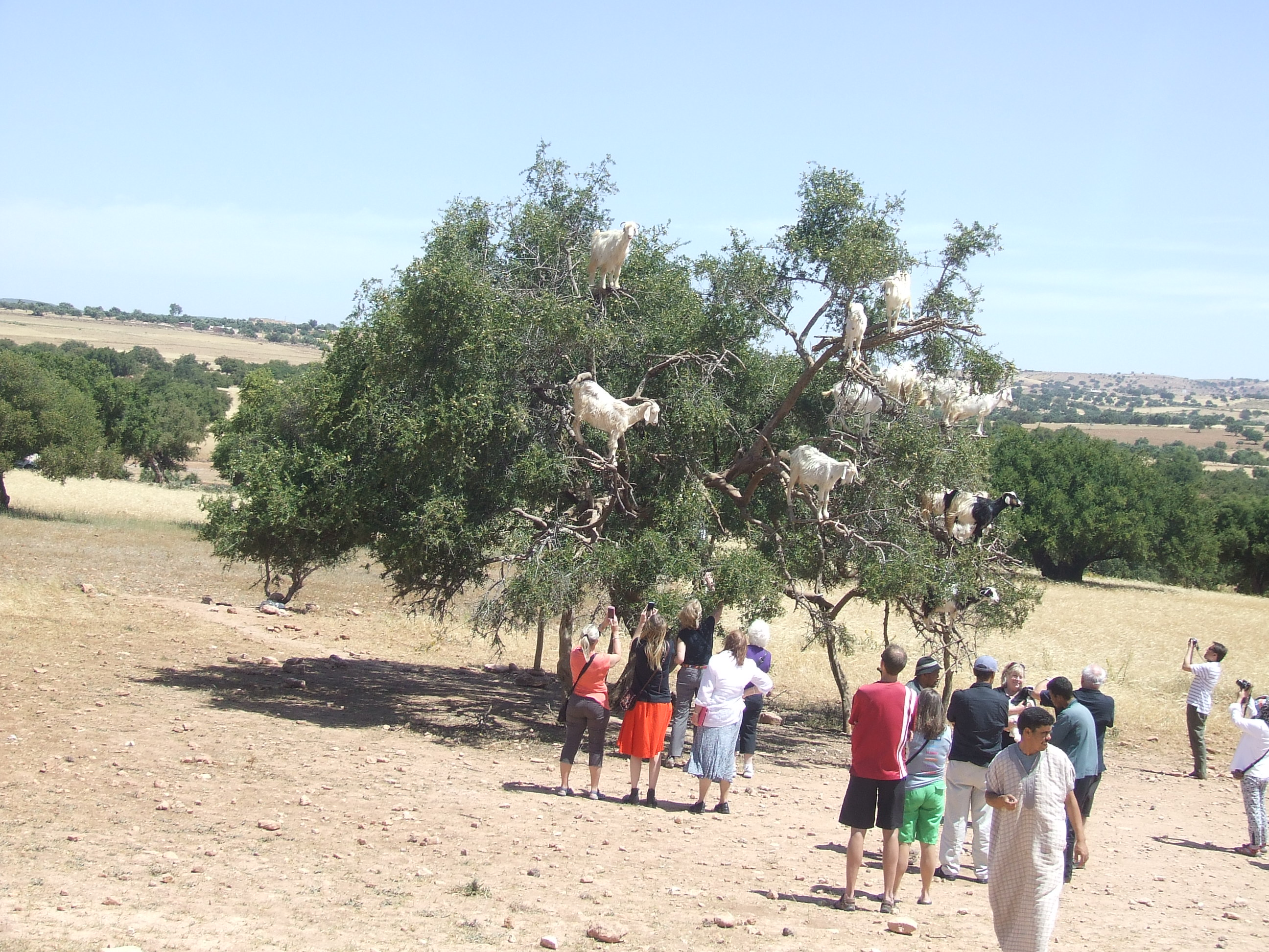 L'arganier; arbre légendaire du sud-ouest marocain, avec des chèvres dessus, toute une histoire entre eux...